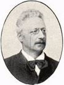 Wilhelm Stolpe (1832-1906), svensk militär